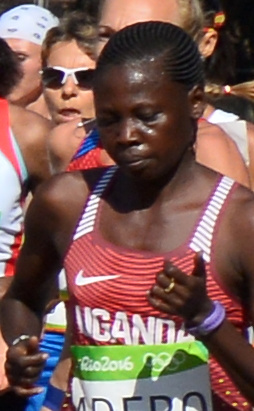 Passage du marathon des jeux olympiques de Rio 2016 dans le centre de Rio